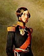 Augusto de Saxe-Coburgo-Gota (1818-1881)